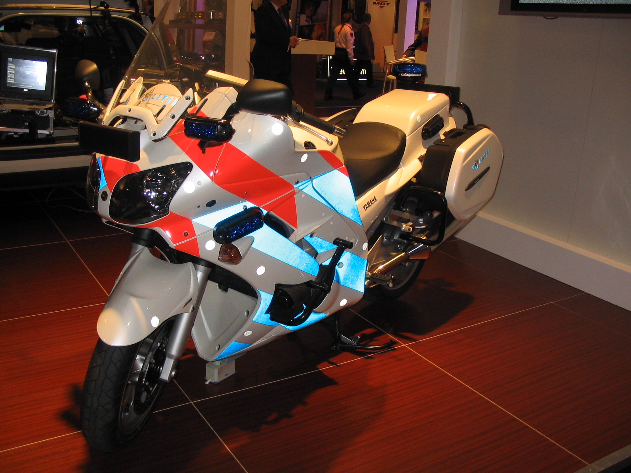 Zelf gemaakte foto